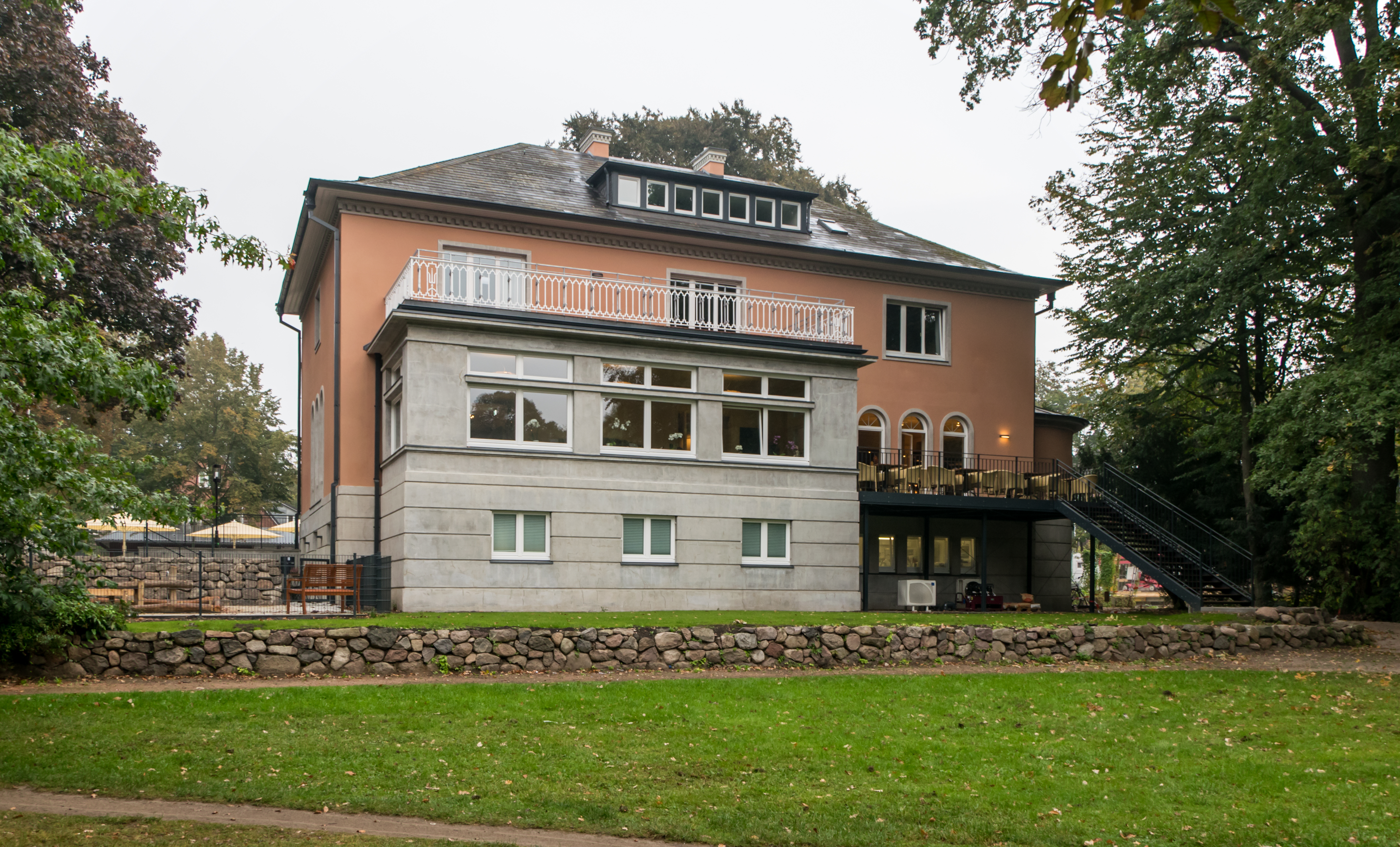 HH-Volksdorf Ohlendorffsche Villa